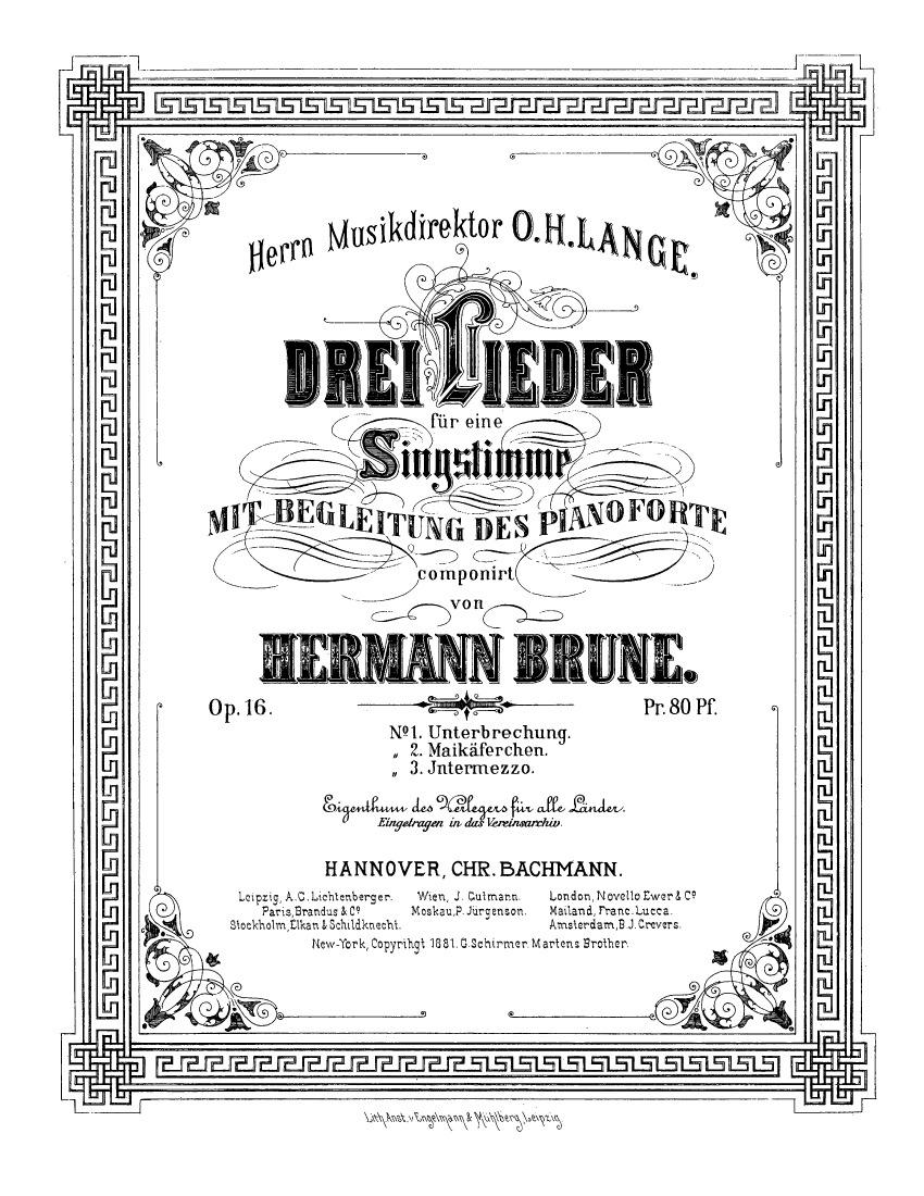 Titelblatt von Hermann Brunes op. 16, Drei Lieder für 1 Singstimme mit Klavierbegleitung. Erschienen 1881. Verlegt bei Chr. Bachmann, Hannover.